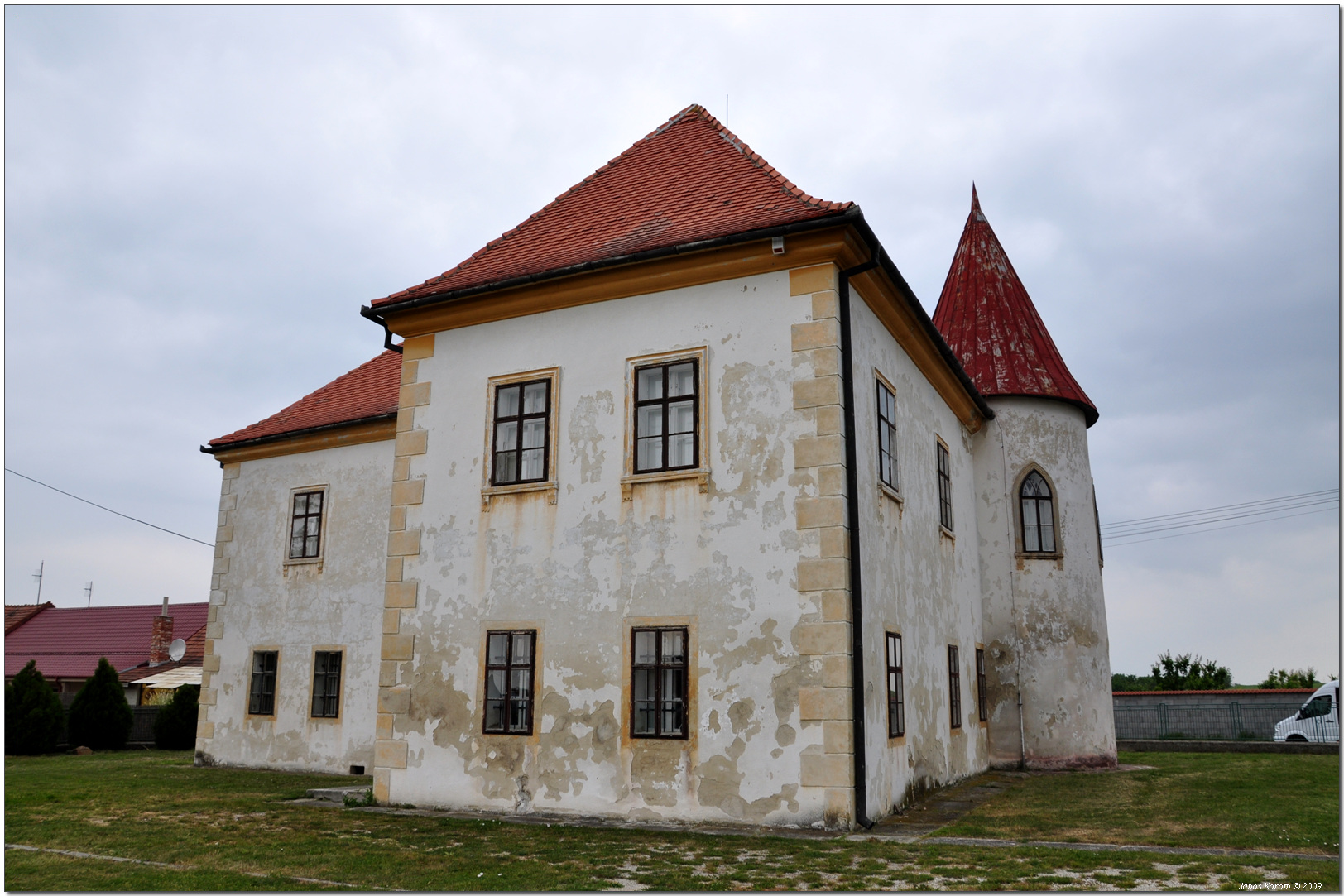 Apponyiho múzeum v Oponiciach